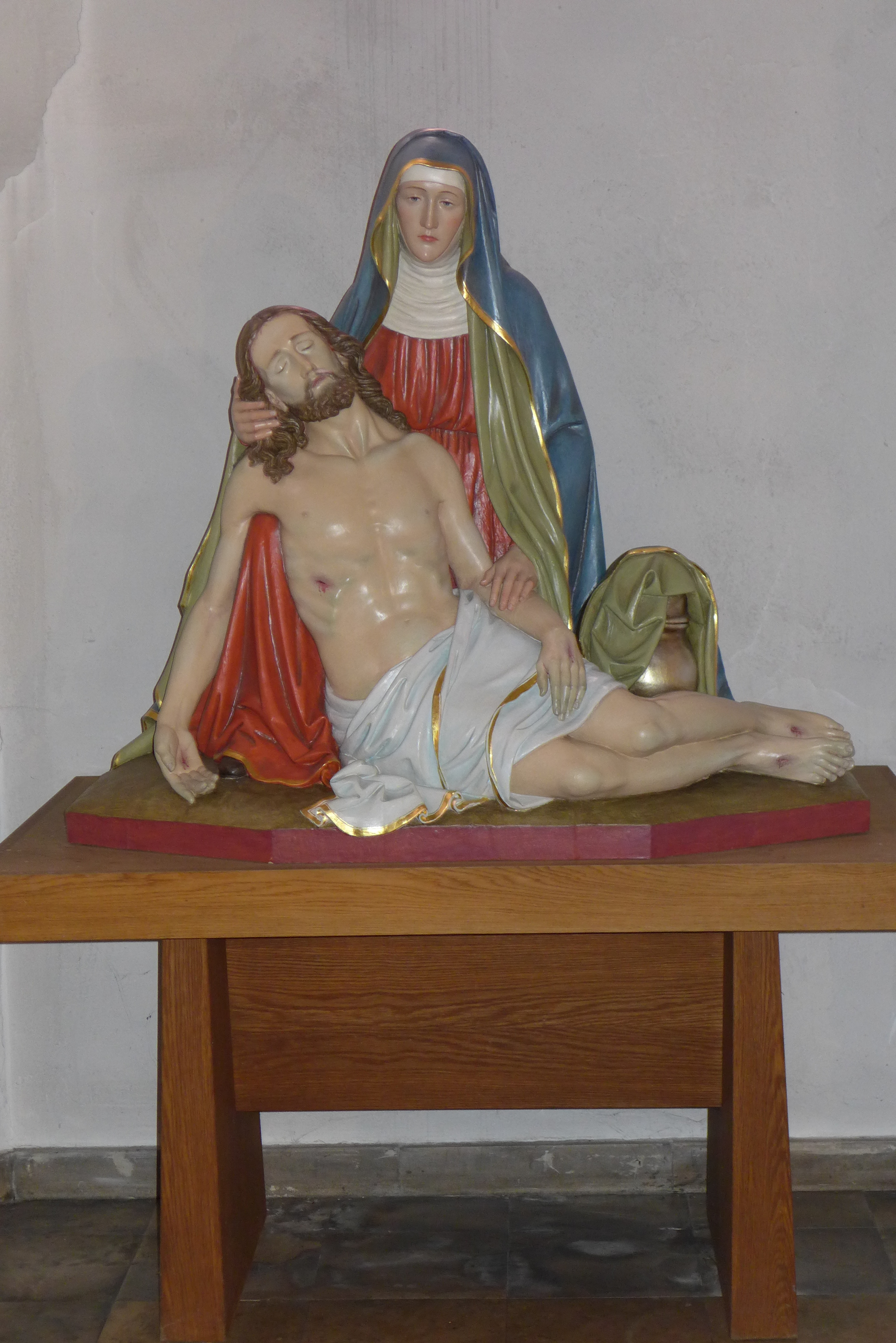 St. Josef (Saarbrücken), Pietà in rekonstruierter Polychromie